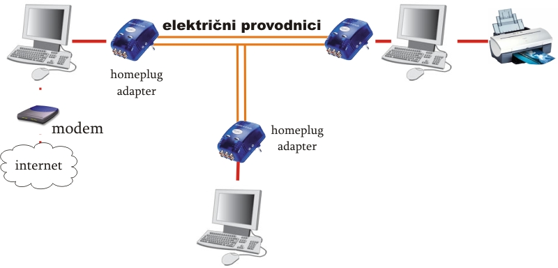 HomePlug network